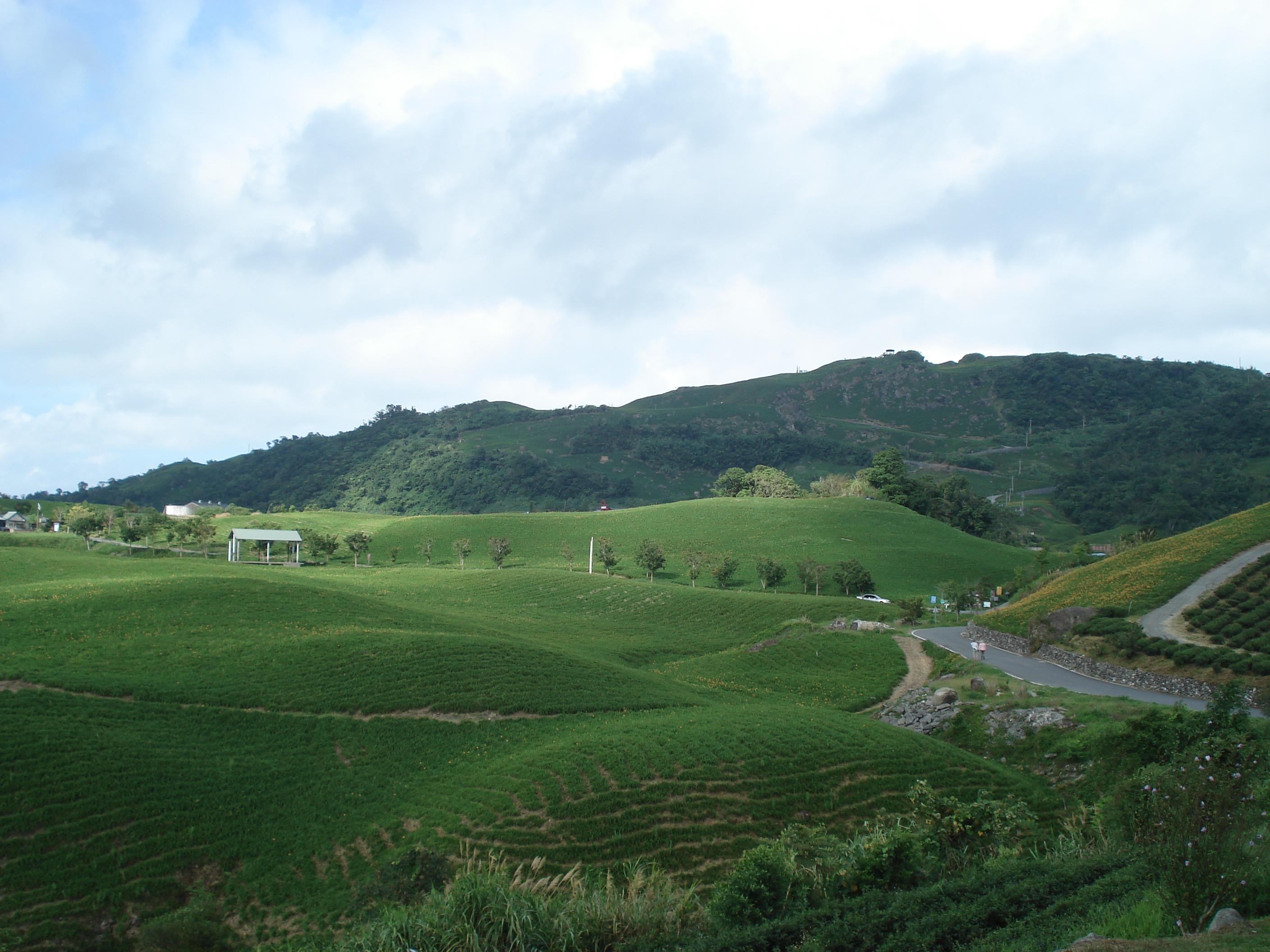 六十石山黃花亭往下拍